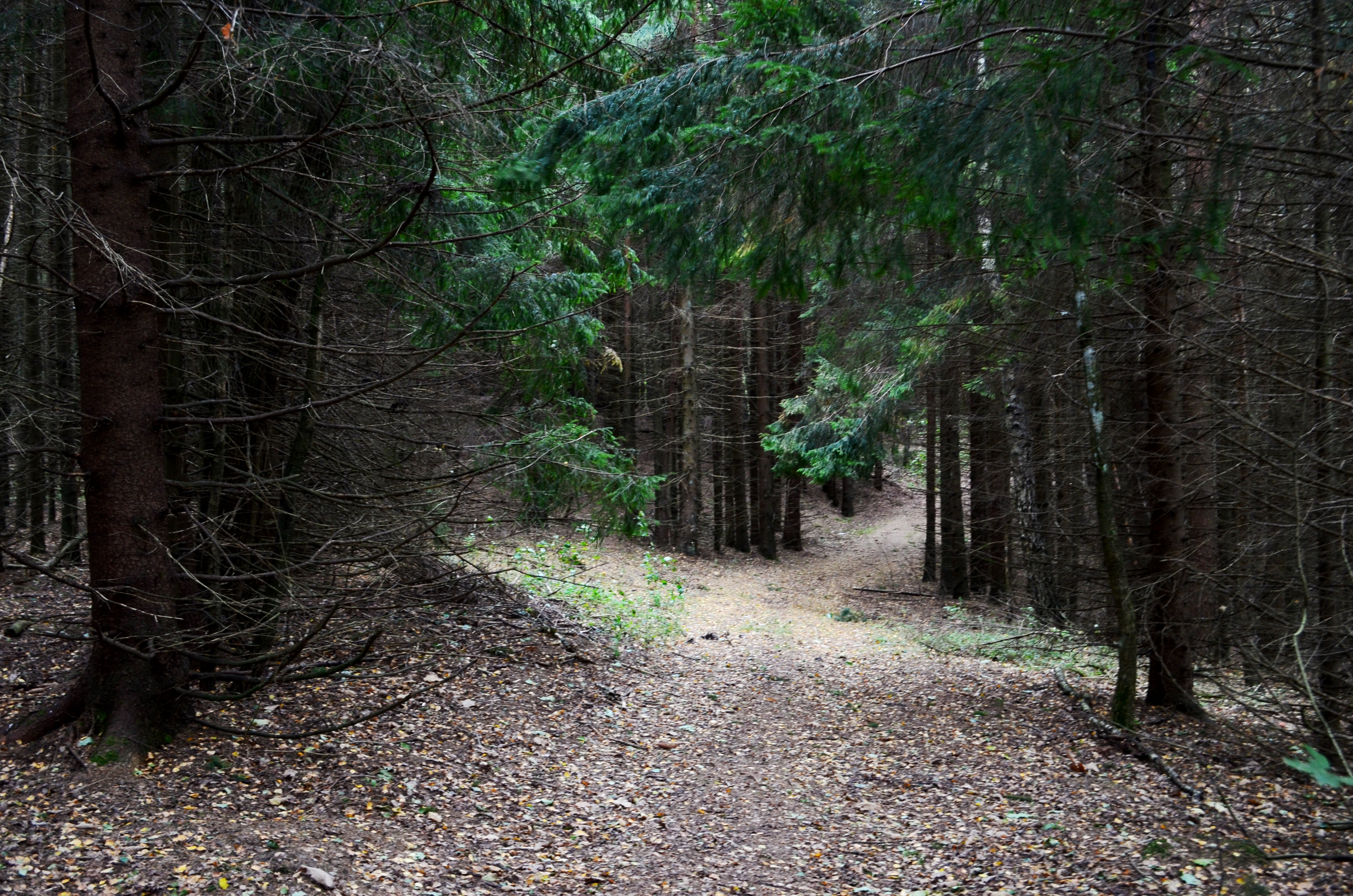 Eglynas ant Girgždūtės kalno, Telšių raj.